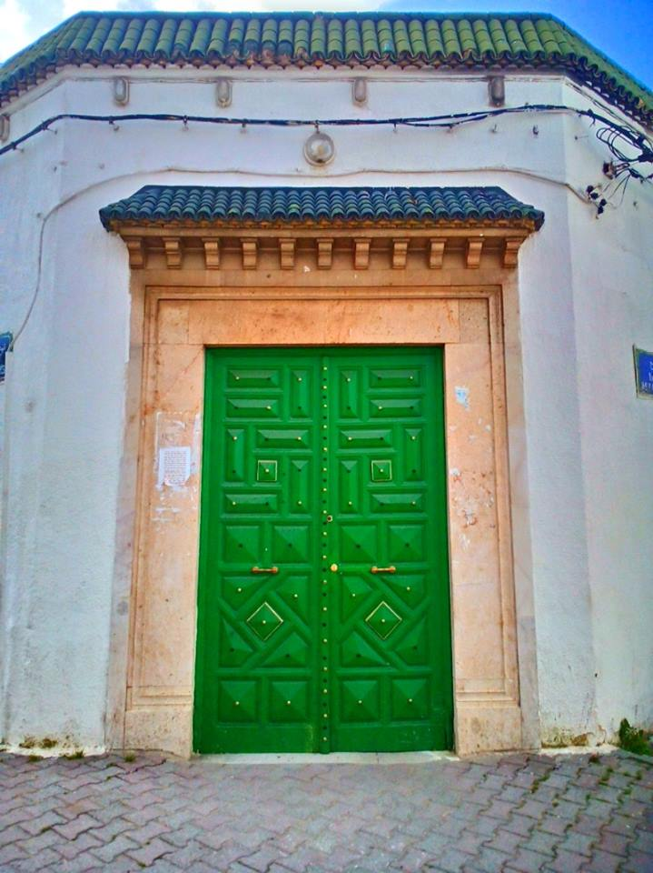 Bab Lakoues, Tunis باب الأقواس ، تونس العاصمة